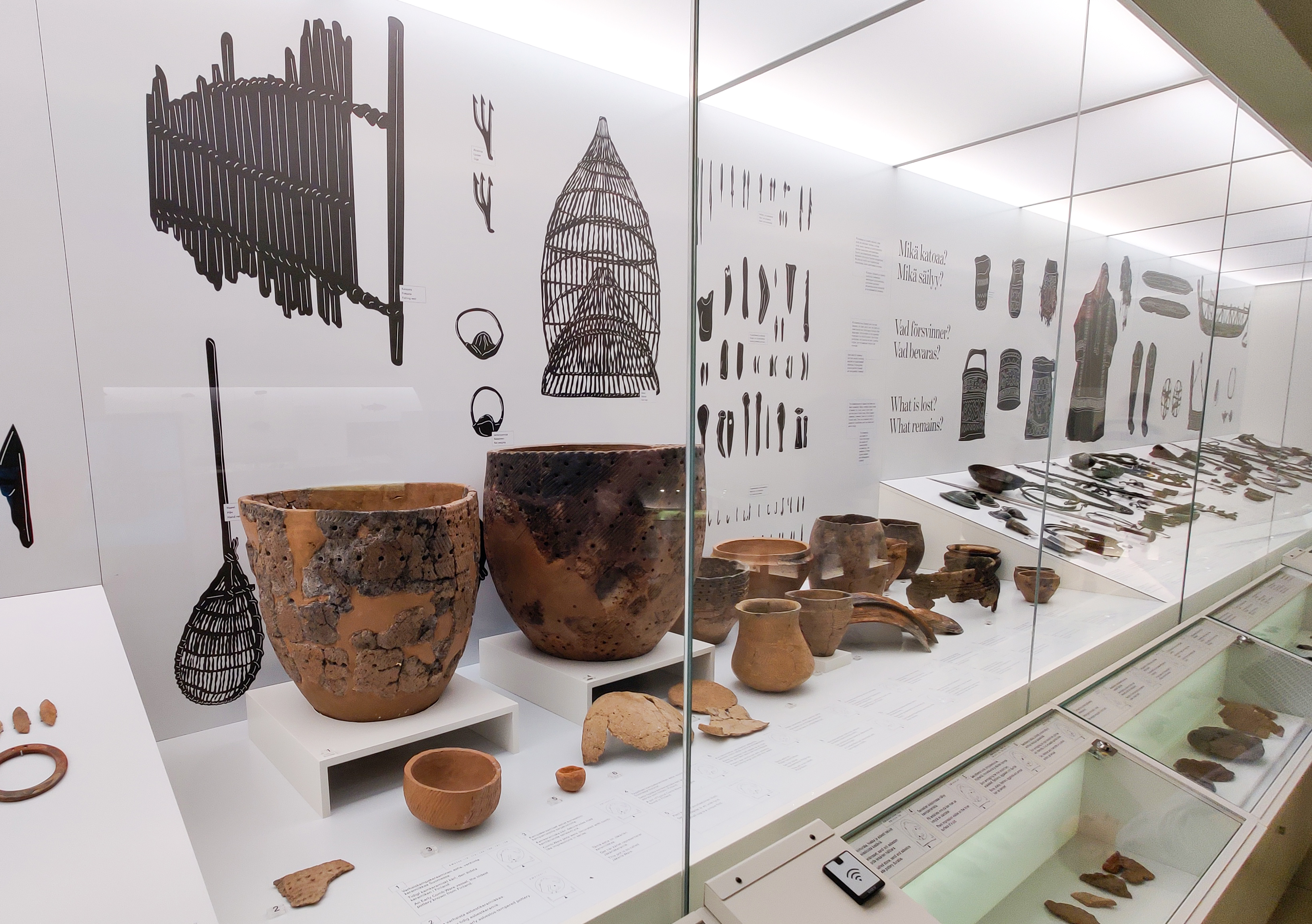 Nuorakeraamisen kulttuurin saviastioita Varsinais-Suomen alueelta